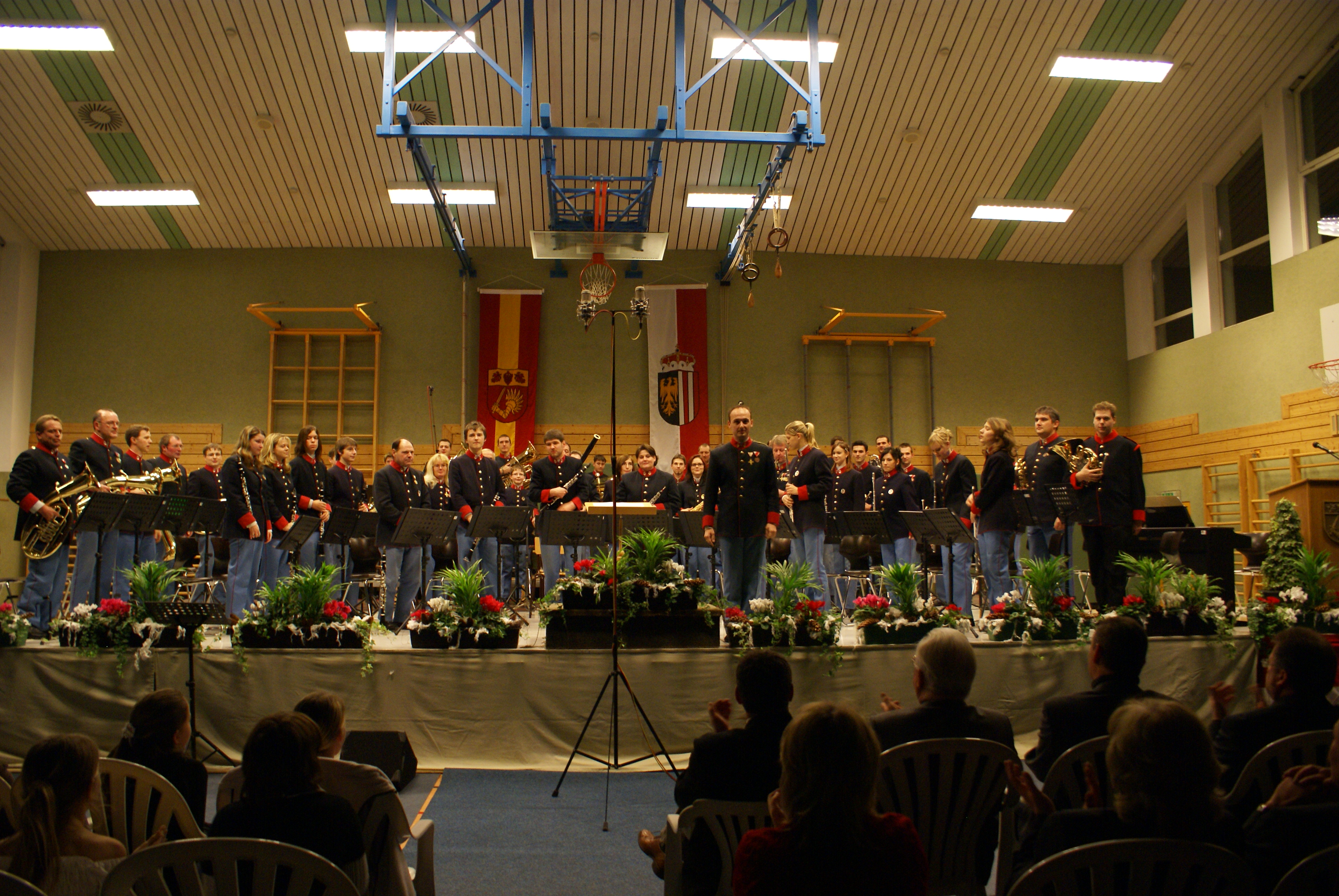 Bürgerkorpskapelle Regau. Musikalische Leitung: Kapellmeister Harald Roth, Obmann: Christian Dausek